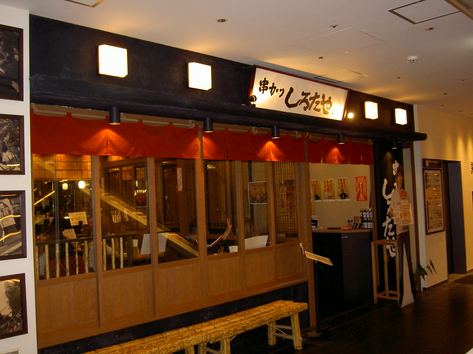 串カツしろたや。大阪府大阪市中央区道頓堀1-7-21 中座くいだおれビル3F